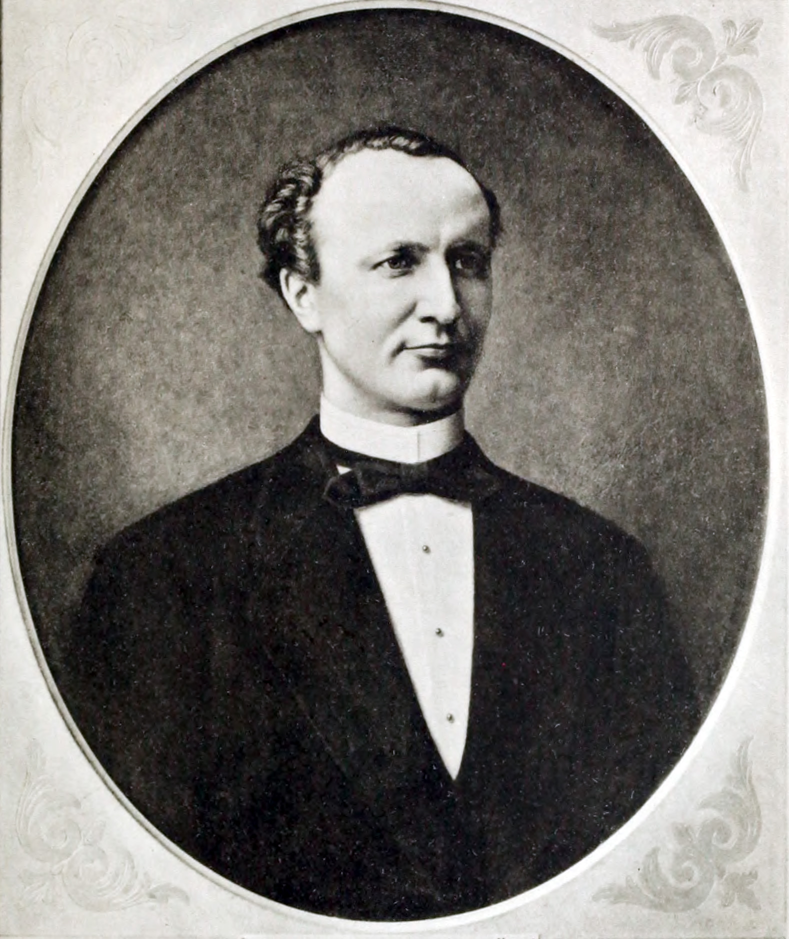 Johan Anton Waldenström (1839-1879)